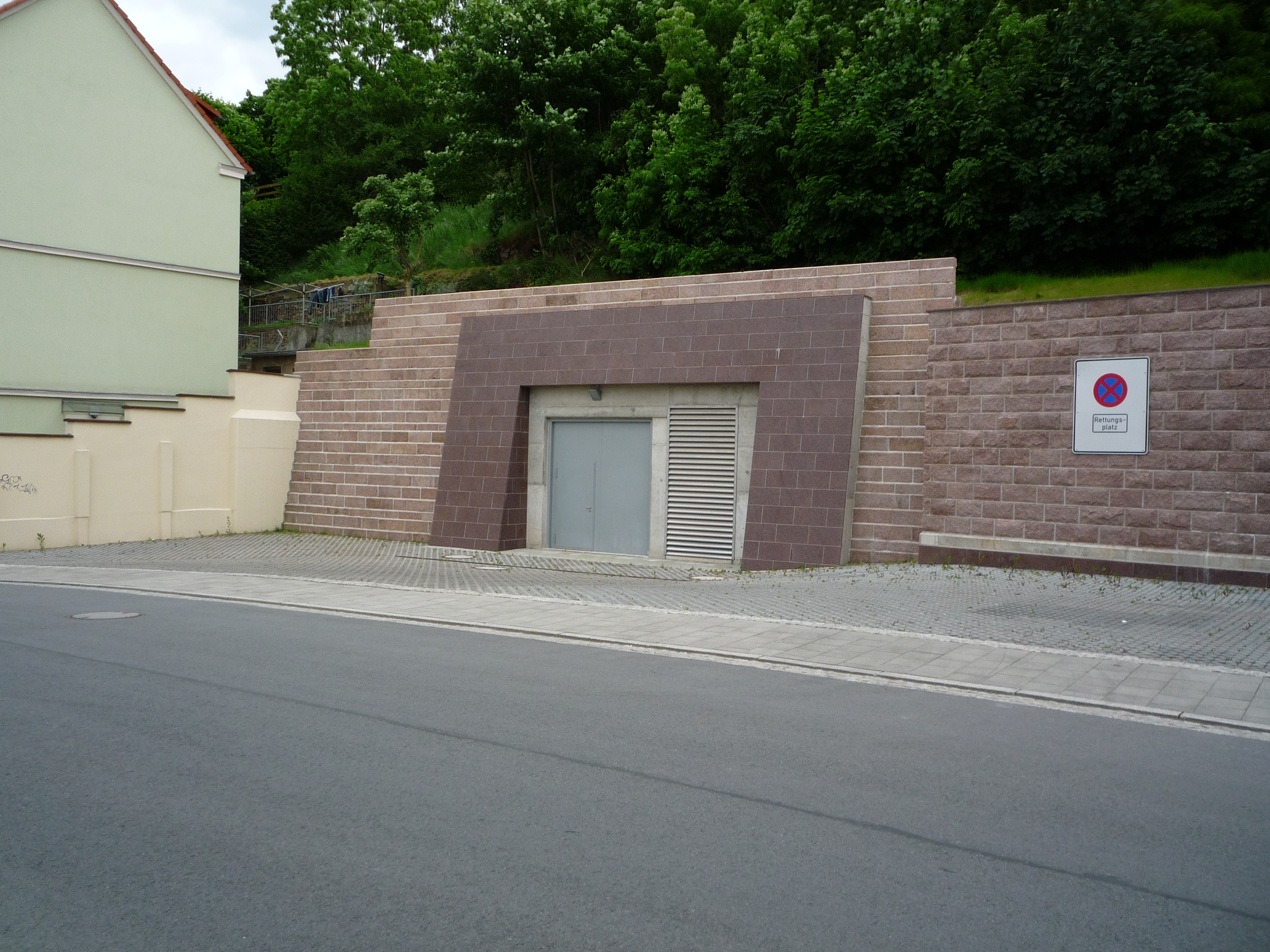 Der östliche Ausgang des Rettungstunnels des Schottenbergtunnels mit Rettungsplatz